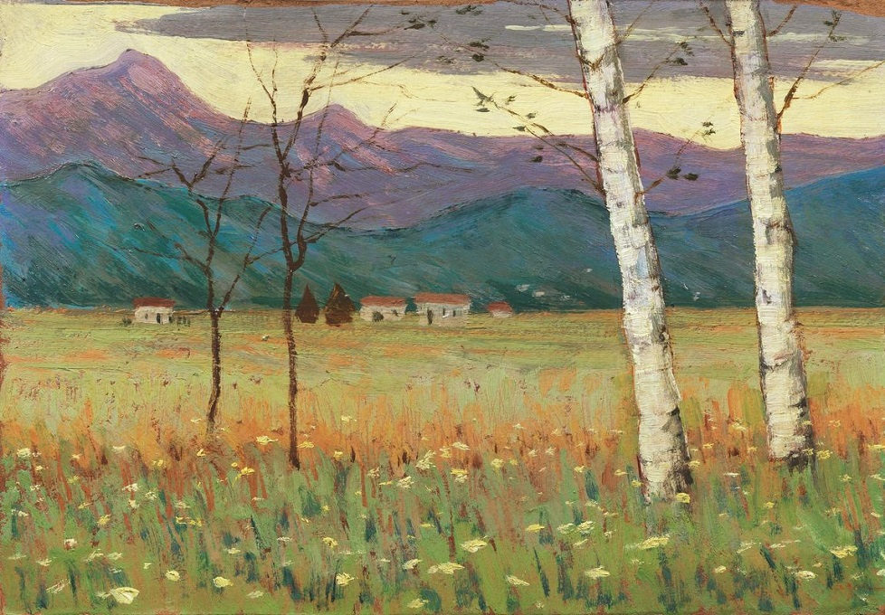 Presso Pietrasanta di sera, olio su cartoncino, cm 21,5 x 32, firmato, coll. privata